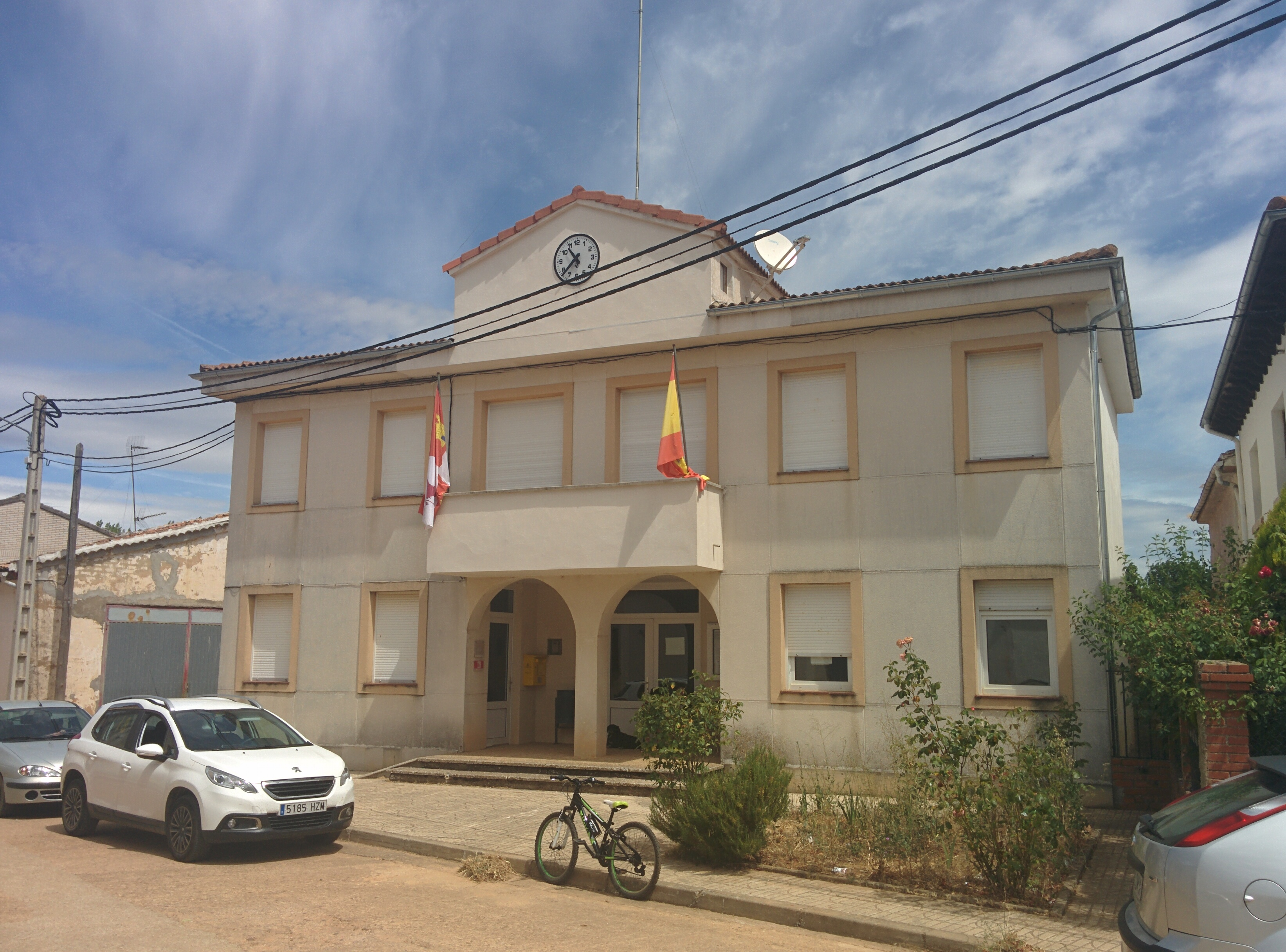 Casa consistorial de Micieces de Ojeda (Palencia, España).